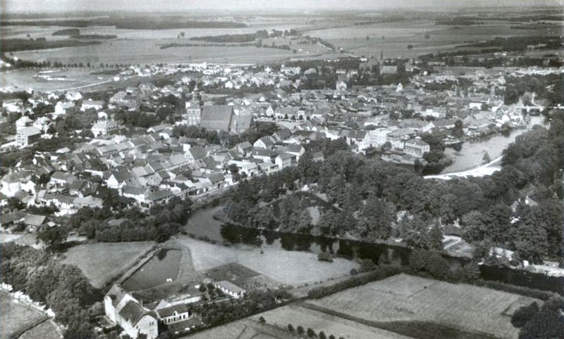 Panorama Gryfic (Polska) w 1940 r. - dawniej Greifenberg/Pommern